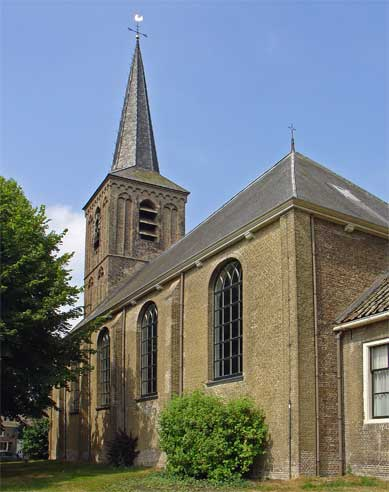 De Nederlands hervormde Kerk van Berkenwoude in Zuid-Holland